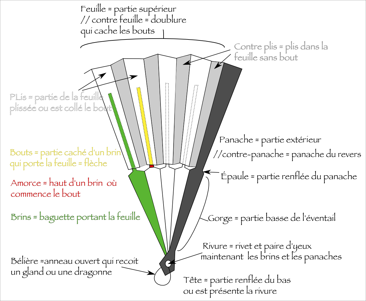 schema d'un éventail